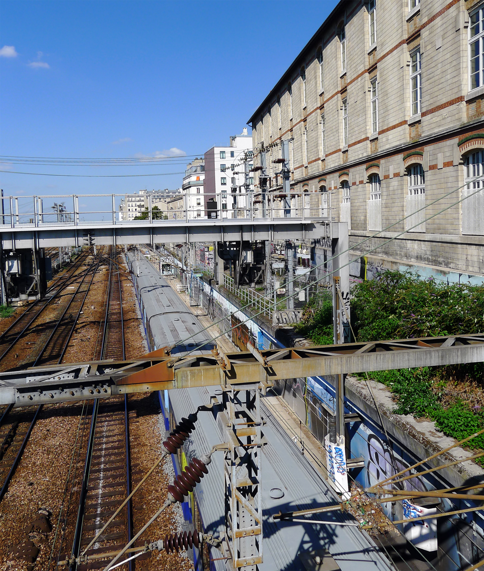 Rue Jean-François-Lépine (passage au dessus des voies SNCF) - Paris XVIII